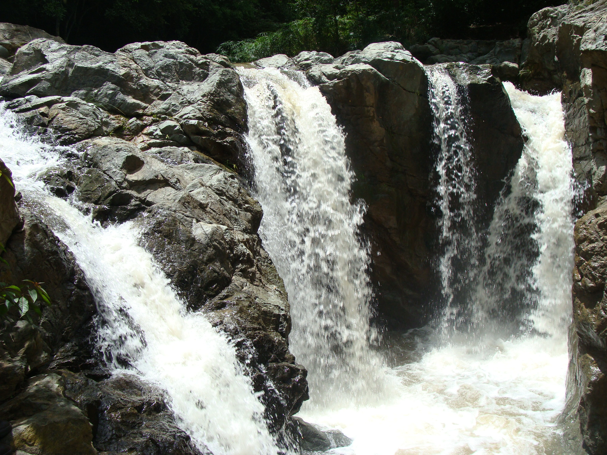 Saltos de agua en el río El Castrero, curso alto del río San Juan, afluente del río Guárico, cerca de San Juan de los Morros (Venezuela), este lugar corresponde a un balneario público.